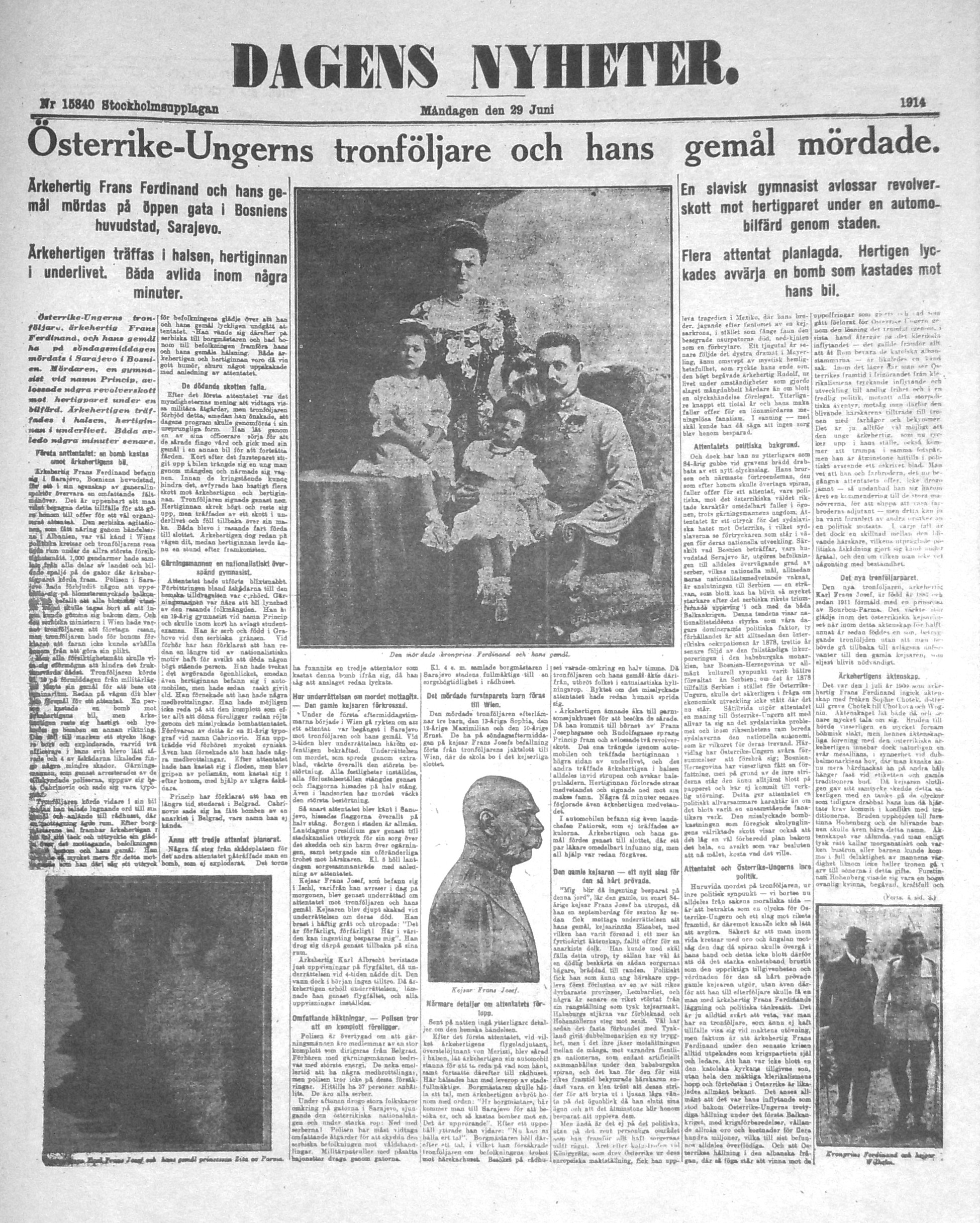 Dagens Nyheter första sida 29 juni 1914 (Österrike-Ungerns tronföljare mördat)